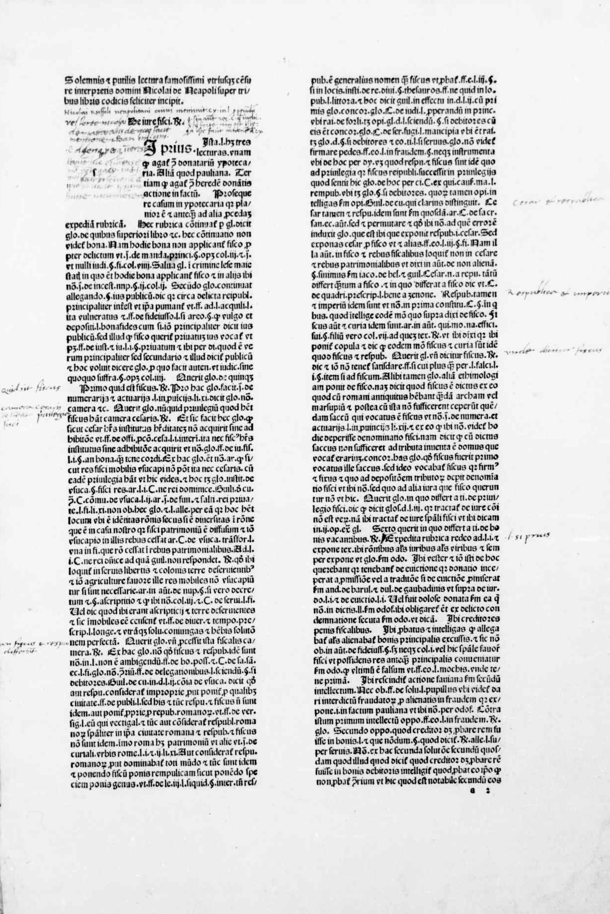 carta a2r